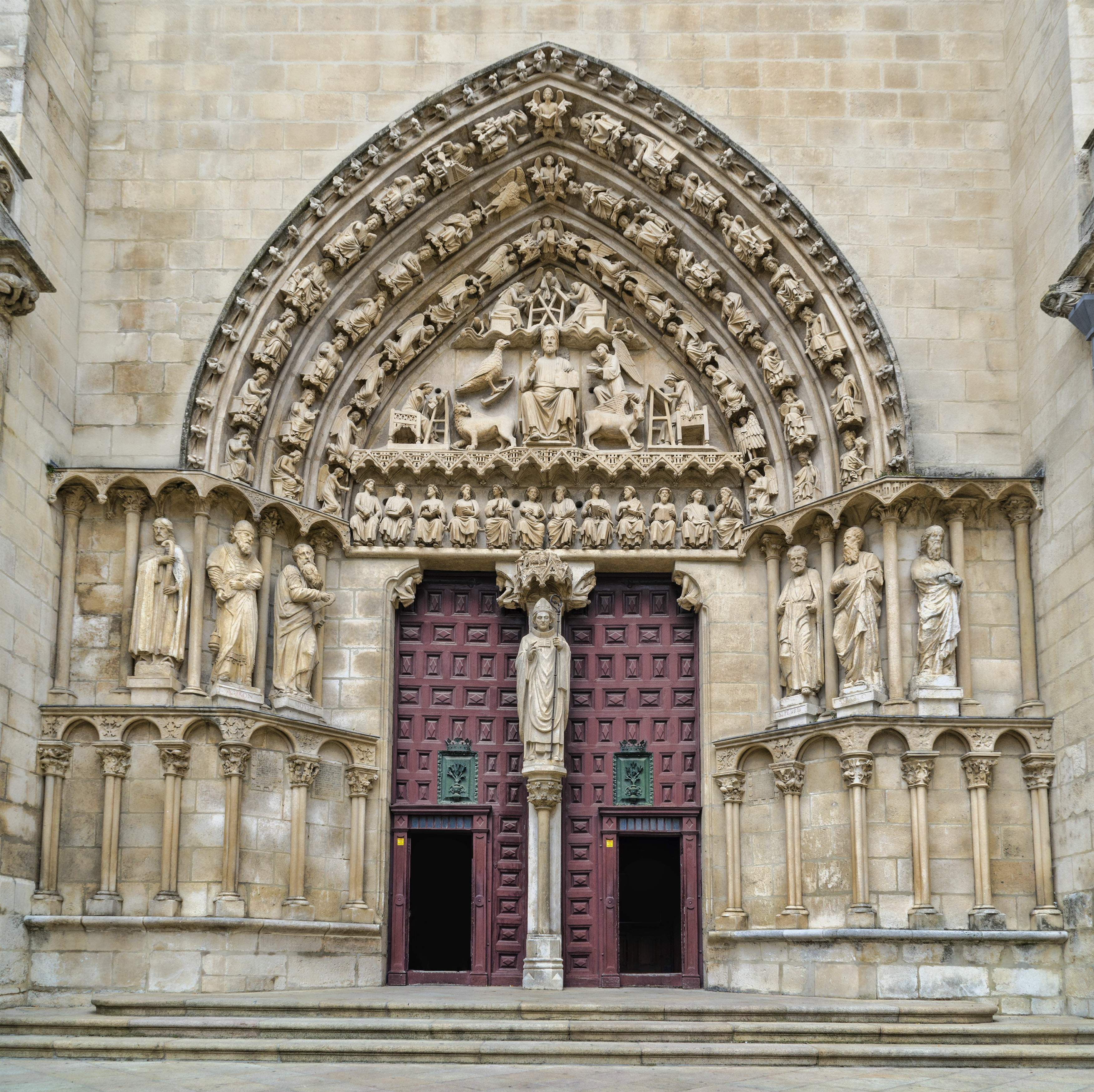 La Puerta del Sarmental, de autor desconocido, está datada en 1240 y según algunos autores constituye el testimonio más antiguo de la escultura gótica en la Península Ibérica.